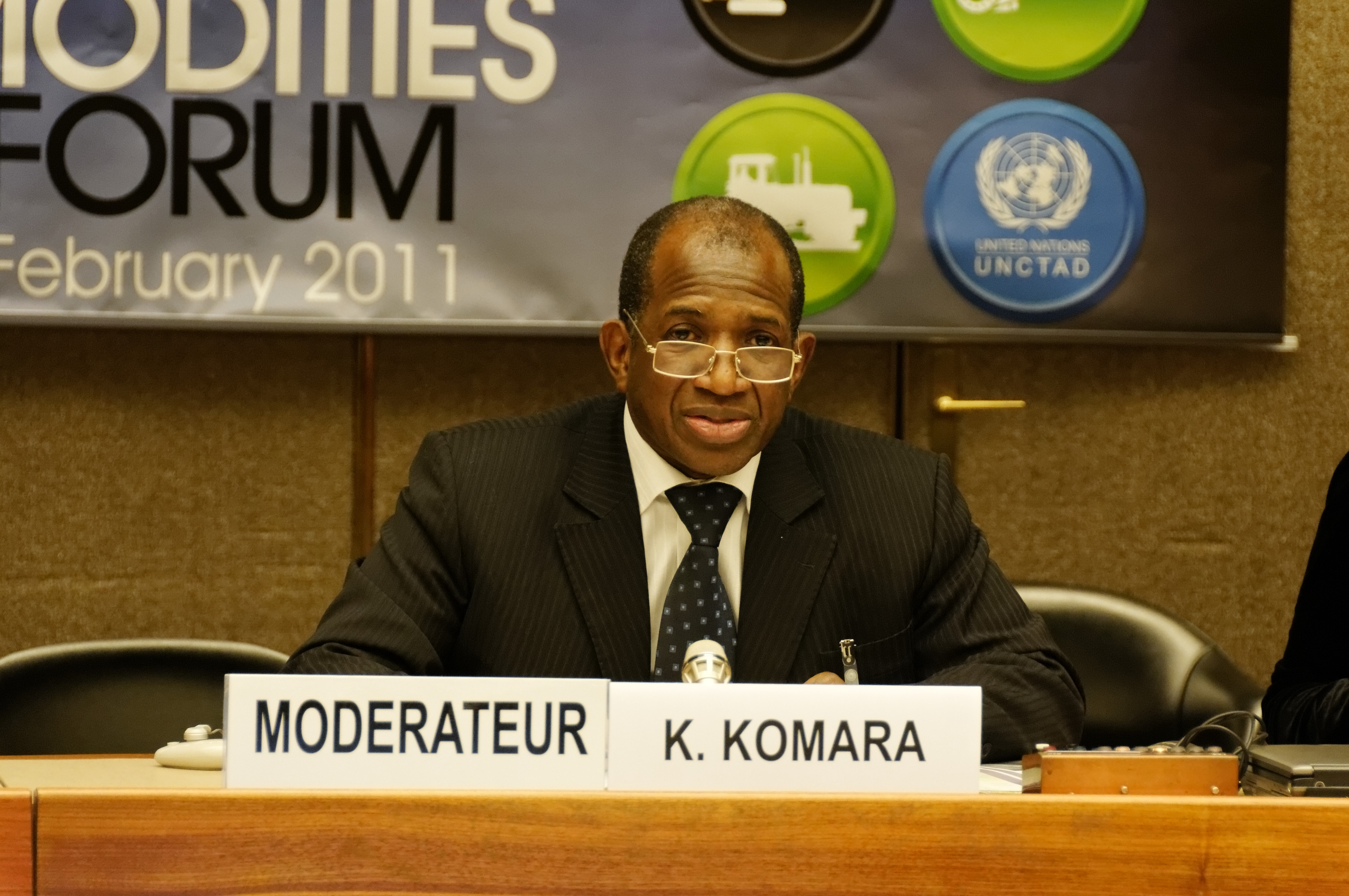 H.E. Mr. Kabine Komara, Former Prime Minister, Guinea